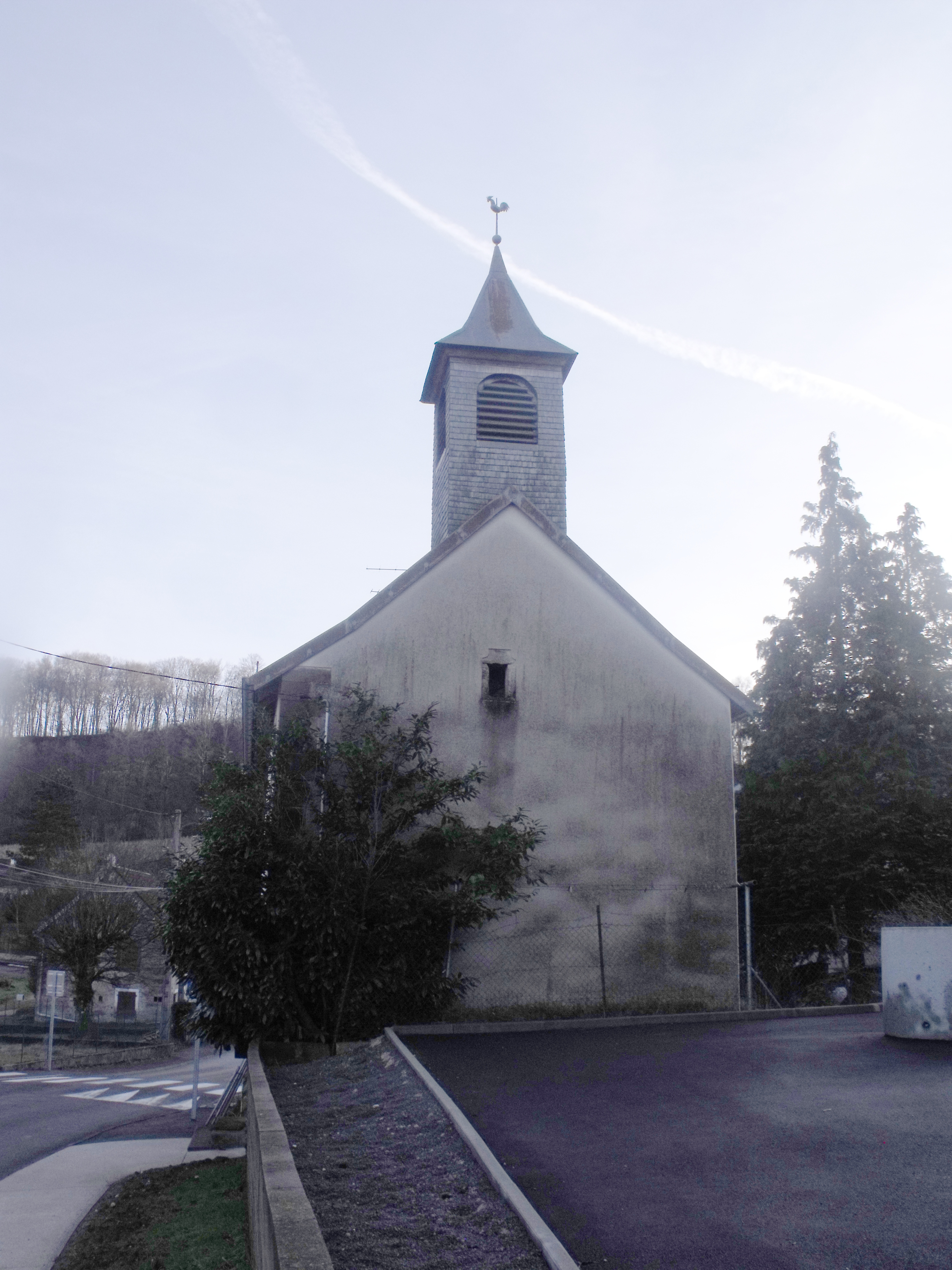 Ancienne chapelle au Vernoy, Doubs, France